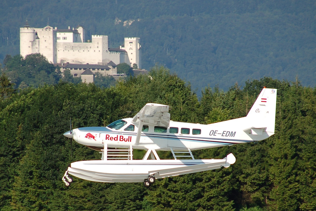 Cessna 208 Caravan Amphibian landing at LOWS (Salzburg)